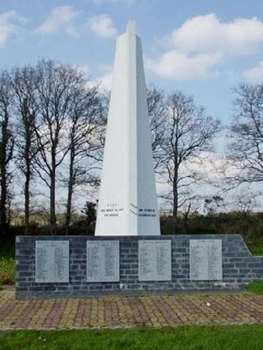 Monument commémoratif des combats du 29 juillet 1944 à La Pie en Paule (Côtes-du-Nord à l'époque, Côtes-d'Armor désormais) qui firent 144 victimes françaises (résistants et victimes civiles) ; les troupes allemandes subirent aussi de nombreuses pertes.